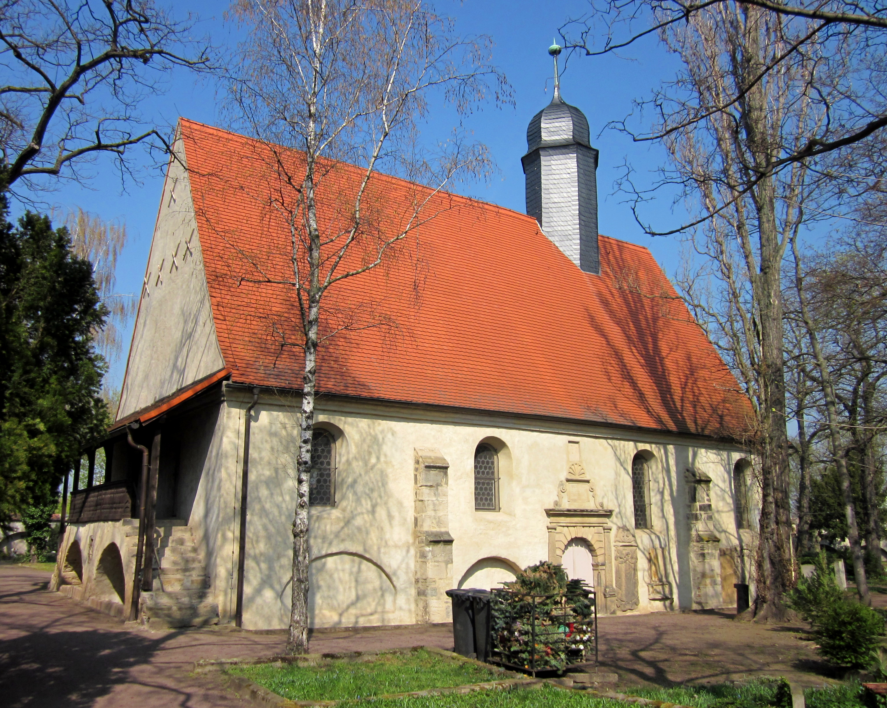 Stadtfriedhof St. Maximi in Merseburg: Friedhofskapelle aus dem Jahr 1613